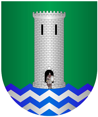 Escudo de armas del apellido Acero. "En campo de sinople, una torre de plata sobre ondas de mar de azur y plata, y a la puerta de la torre un guerrero armado con rodela y espada, la hoja de plata y guarnición de oro."